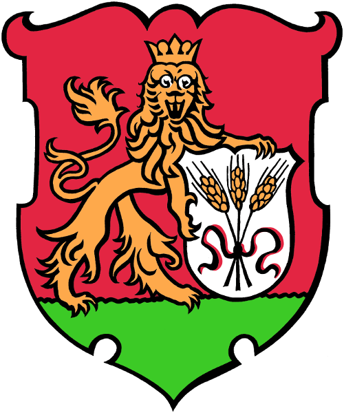 Am 14. Jänner 1902 verlieh das k.k. Ministerium des Innern der Gemeinde das Recht zur Führung des althergebrachten Lustenauer Wappens, welches eine Modifizierung des reichshöfischen Siegels darstellt. Der im Zentrum stehende Löwe dürfte ursprünglich aus dem Wappen des Hofammanns Magnus Hagen stammen, das diesem 1599 verliehen worden war. Auch die Krone, die der Löwe trägt, weist in die reichshöfische Zeit zurück. Die drei Ähren im Schild erinnern an die einstige Bedeutung des Getreideanbaus in Lustenau.